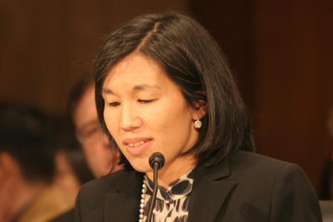 Nicole Wong 谷歌副总裁黄安娜